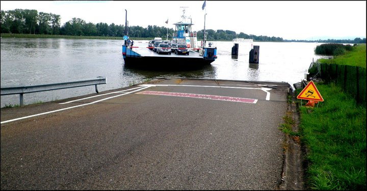 Bac automoteur transfrontalier reliant la France à l'Allemagne. (Ici aux abords de la rive allemande)